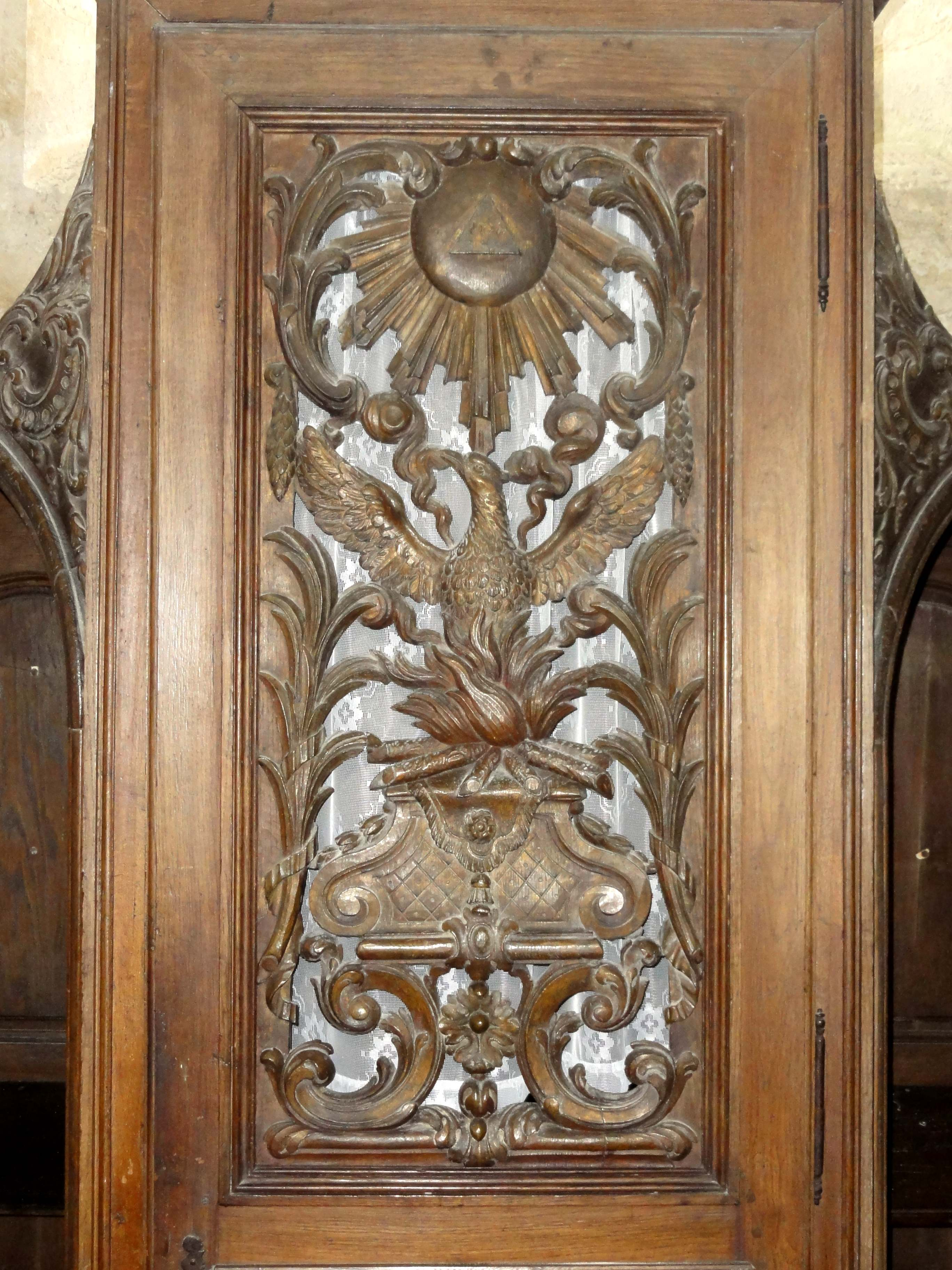 Mobilier de l'église - voir titre.